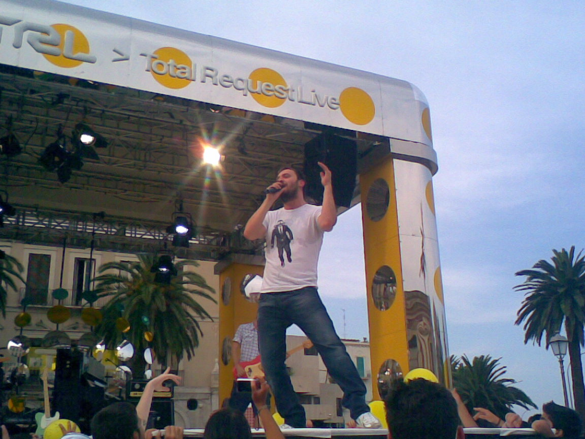 Cesare Cremonini